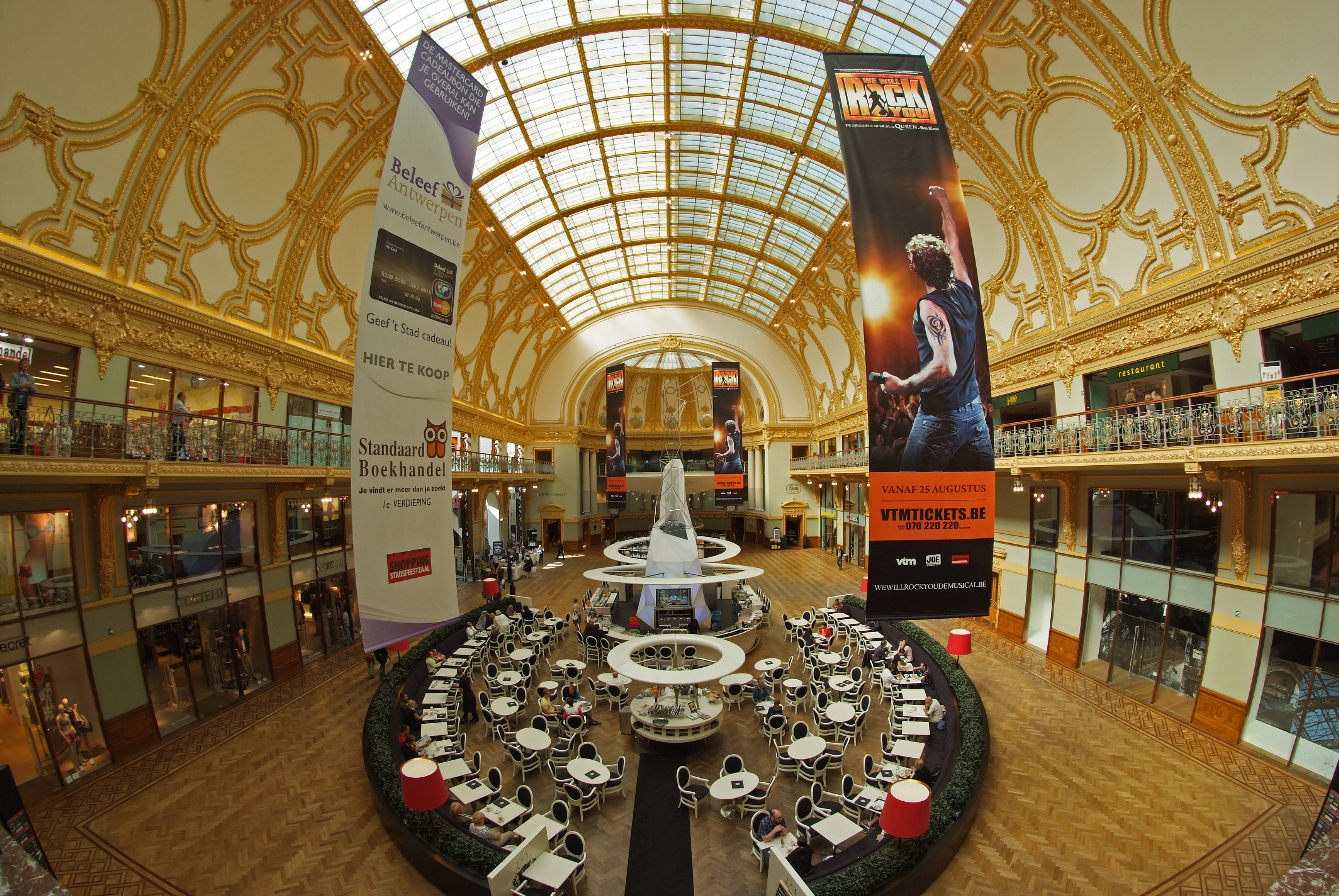 Stadsfeestzaal, Provincie: Antwerpen, Stad: Antwerpen